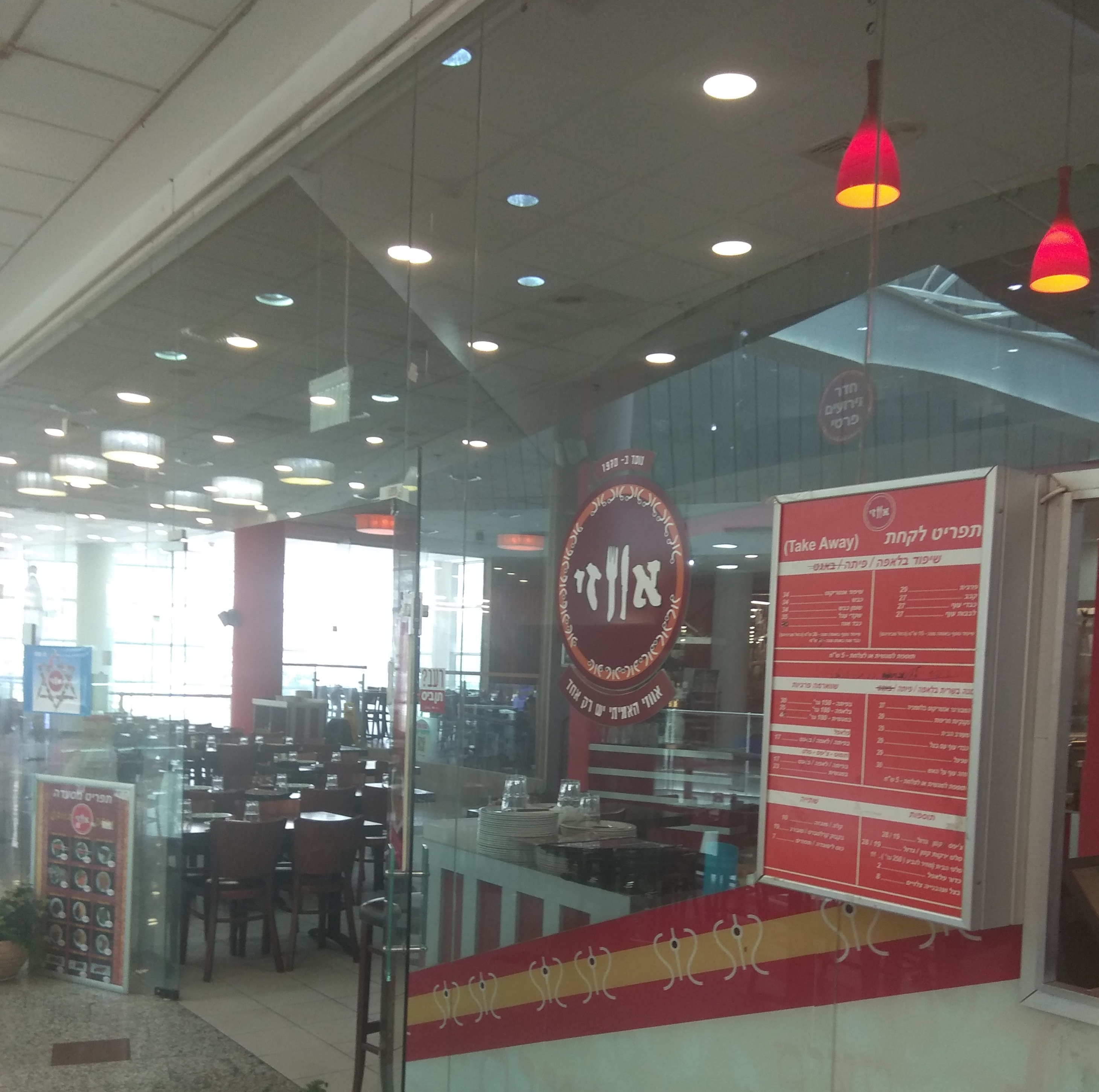 מסעדת אווזי